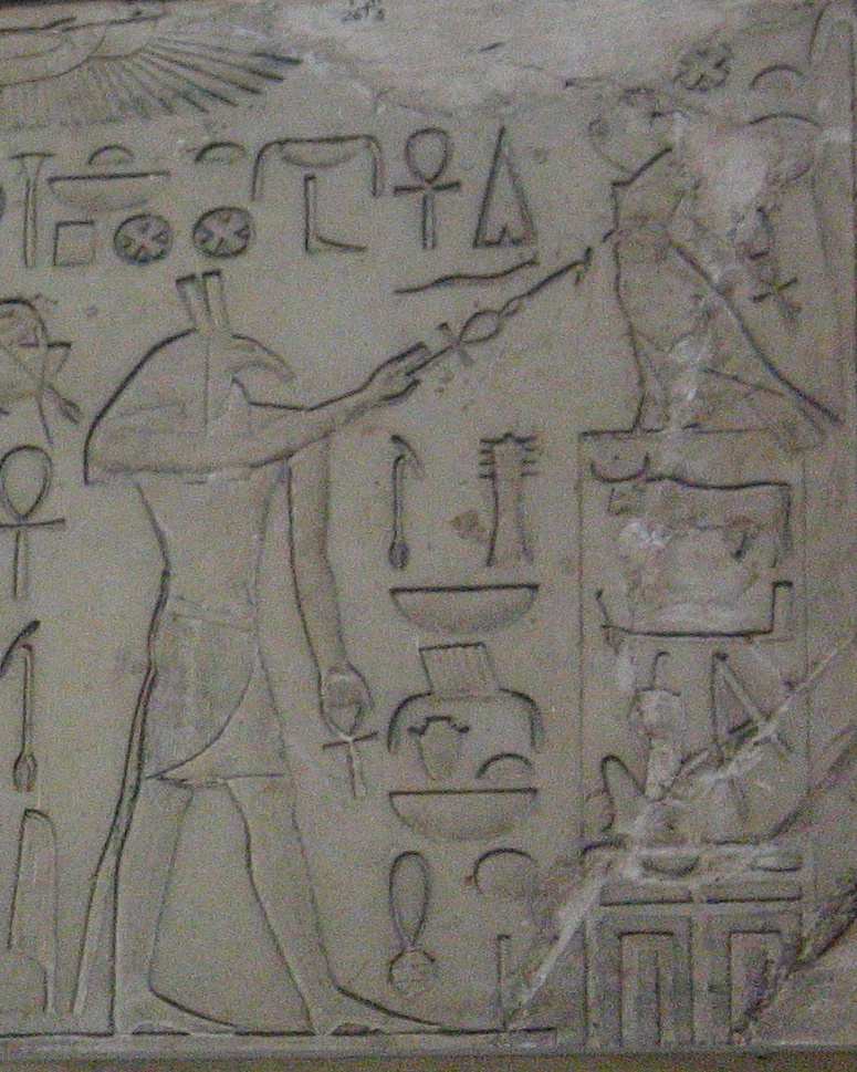 Seth donnant vie et puissance au pharaon Thoutmosis Ier au foucon et la titulature royale